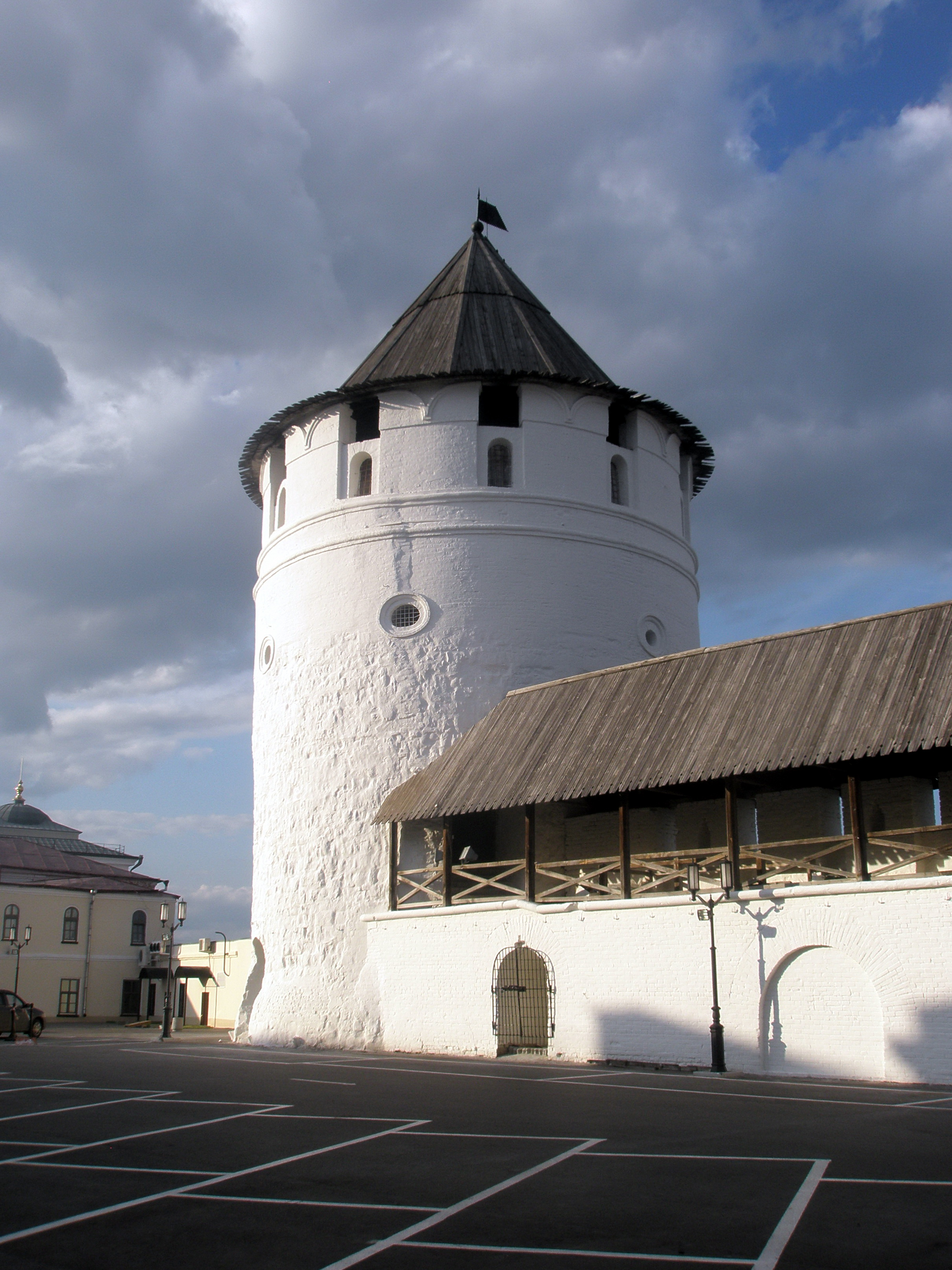 Консисторская башня Казанского кремля